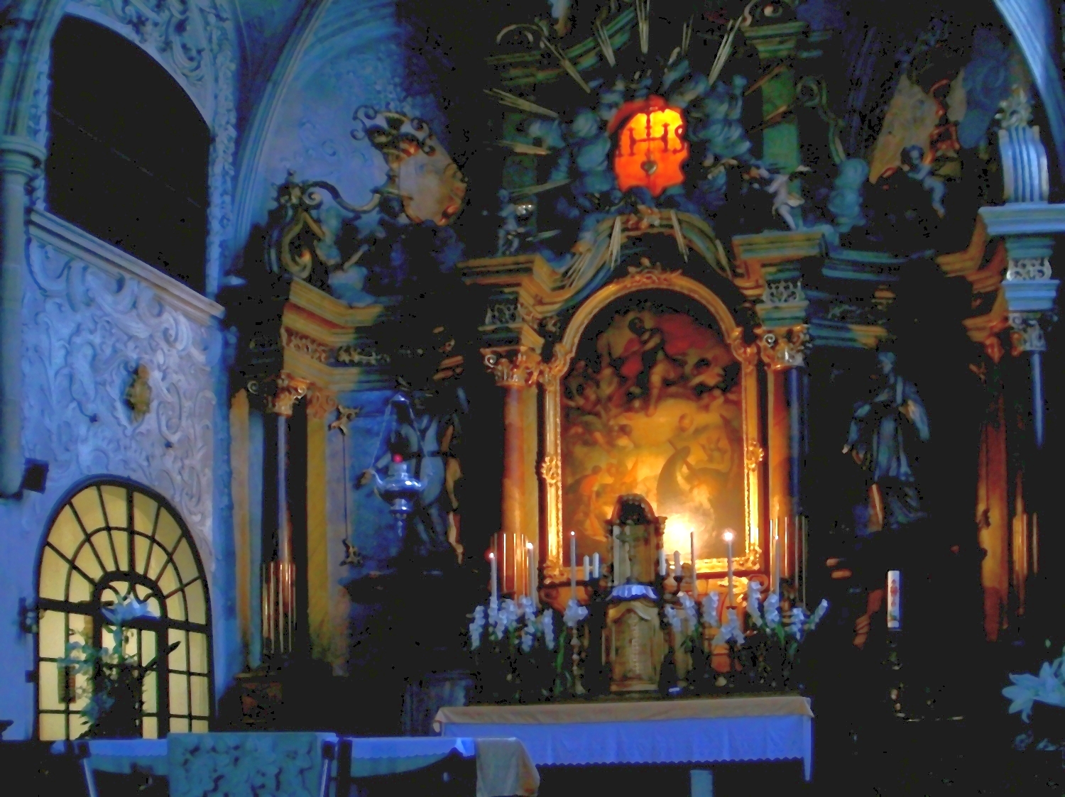 Szent György templom (Sopron, Szent György u.) This is a photo of a monument in Hungary, Identifier: 4898